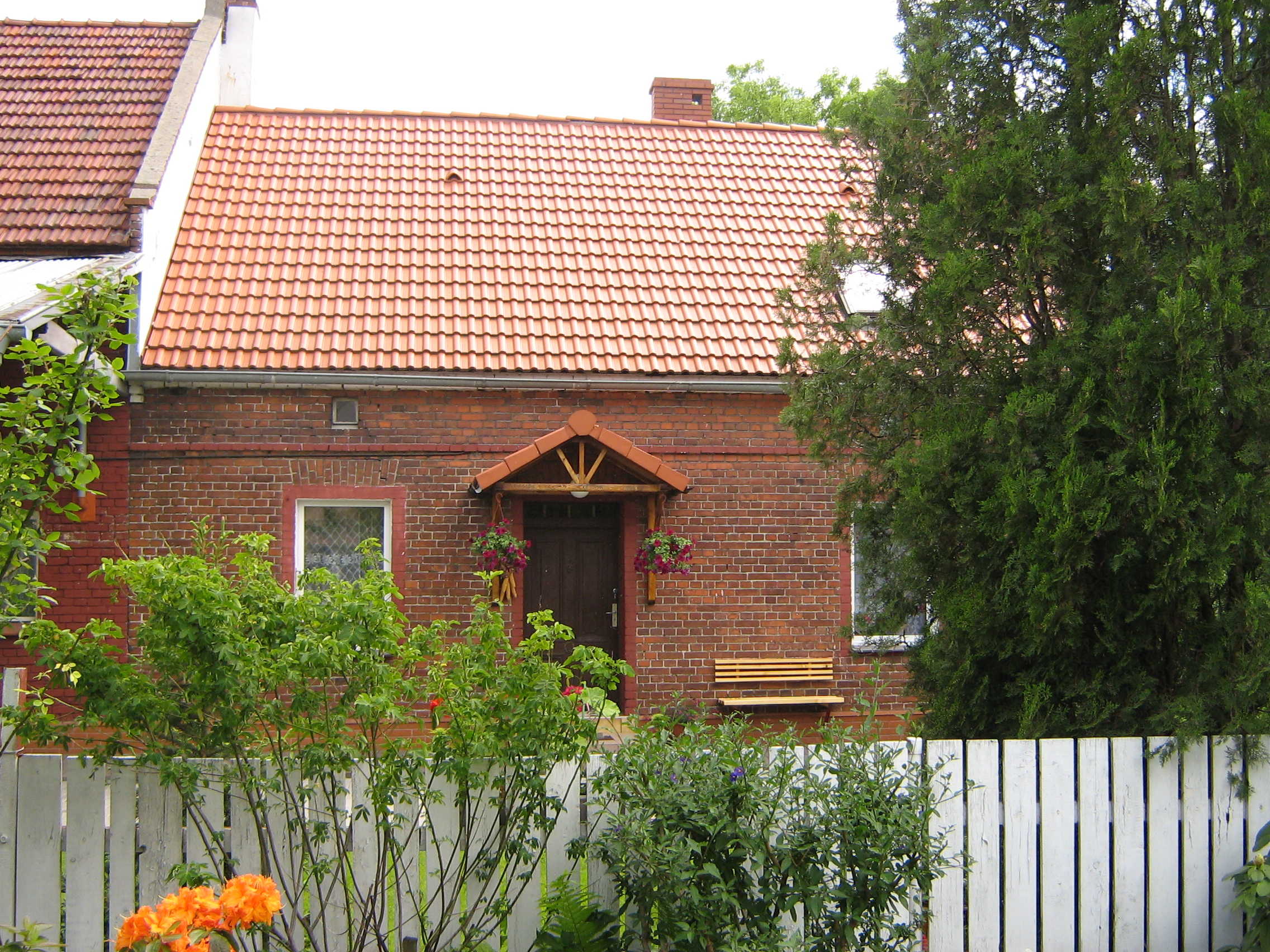 Dobrzykowice dom Kargula Widok zza płota ;)